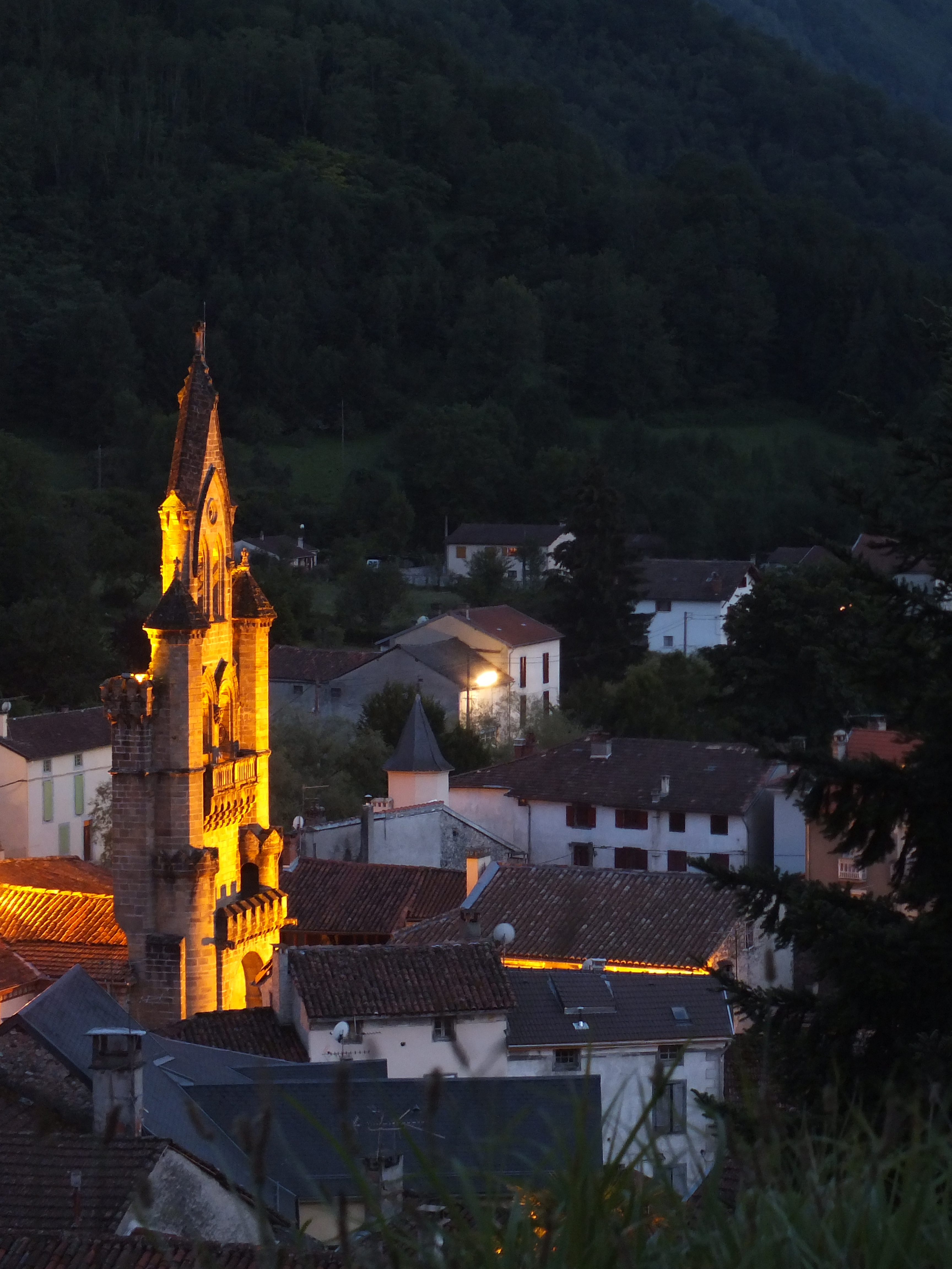 Église Saint Etienne, Seix (09) .